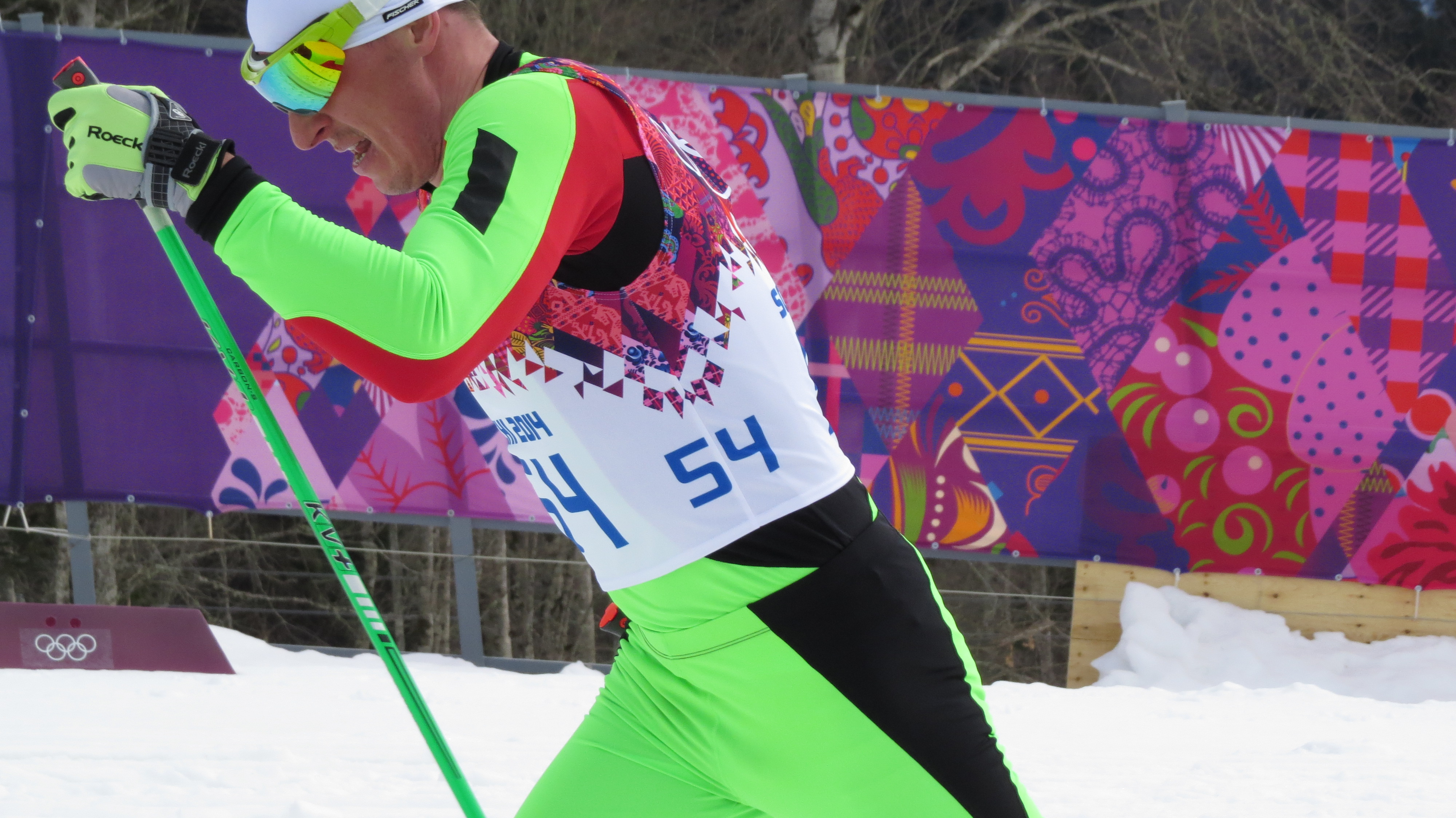 Лыжные гонки на зимних Олимпийских играх 2014 — 15 км классическим стилем (мужчины)